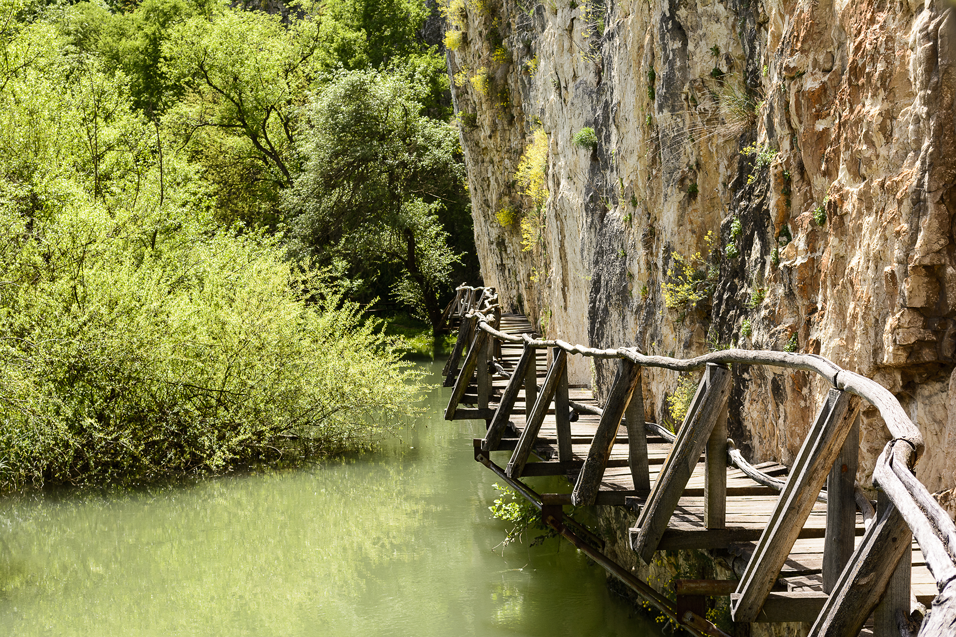 Панега е малка , но изключително живописна река. Води началото си от най-големия карстов извор в България, наречен Глава Панега. Тя тече на север и по пътя си образува красив пролом в района град Луковит. Малко преди да стигне до гр. Червен Бряг, реката се влива във водите на Искър. До град Луковит, в пролома е направена екопътека, която блести с очарователна красота.